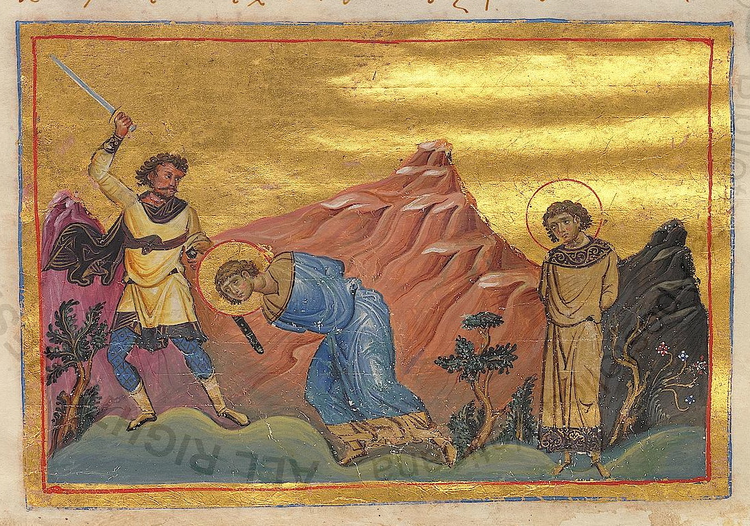 Константинополь. 985 г. Миниатюра Минология Василия II. Ватиканская библиотека. Рим.